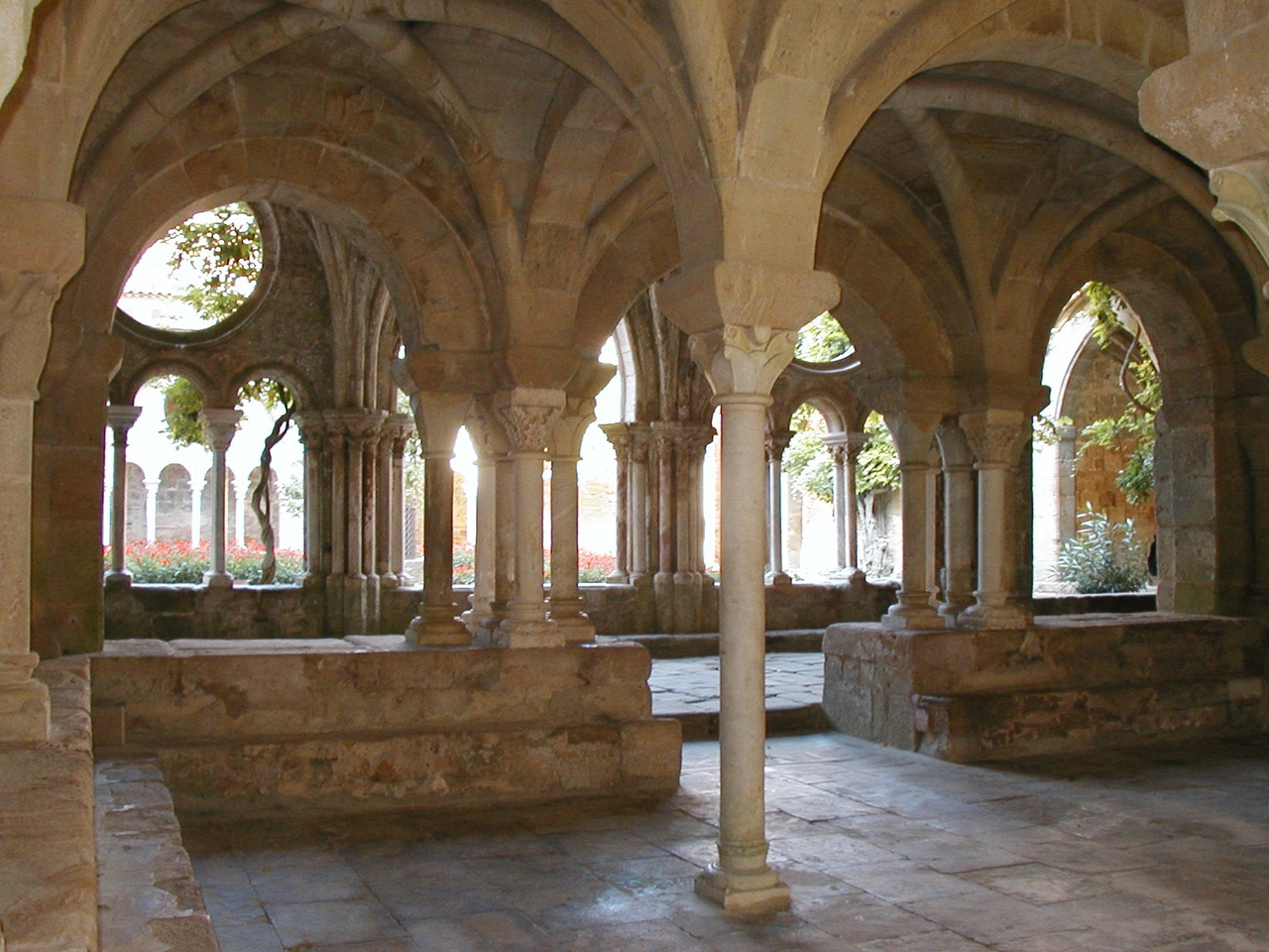 Salle du Chapitre M. Disdero Octobre 2002